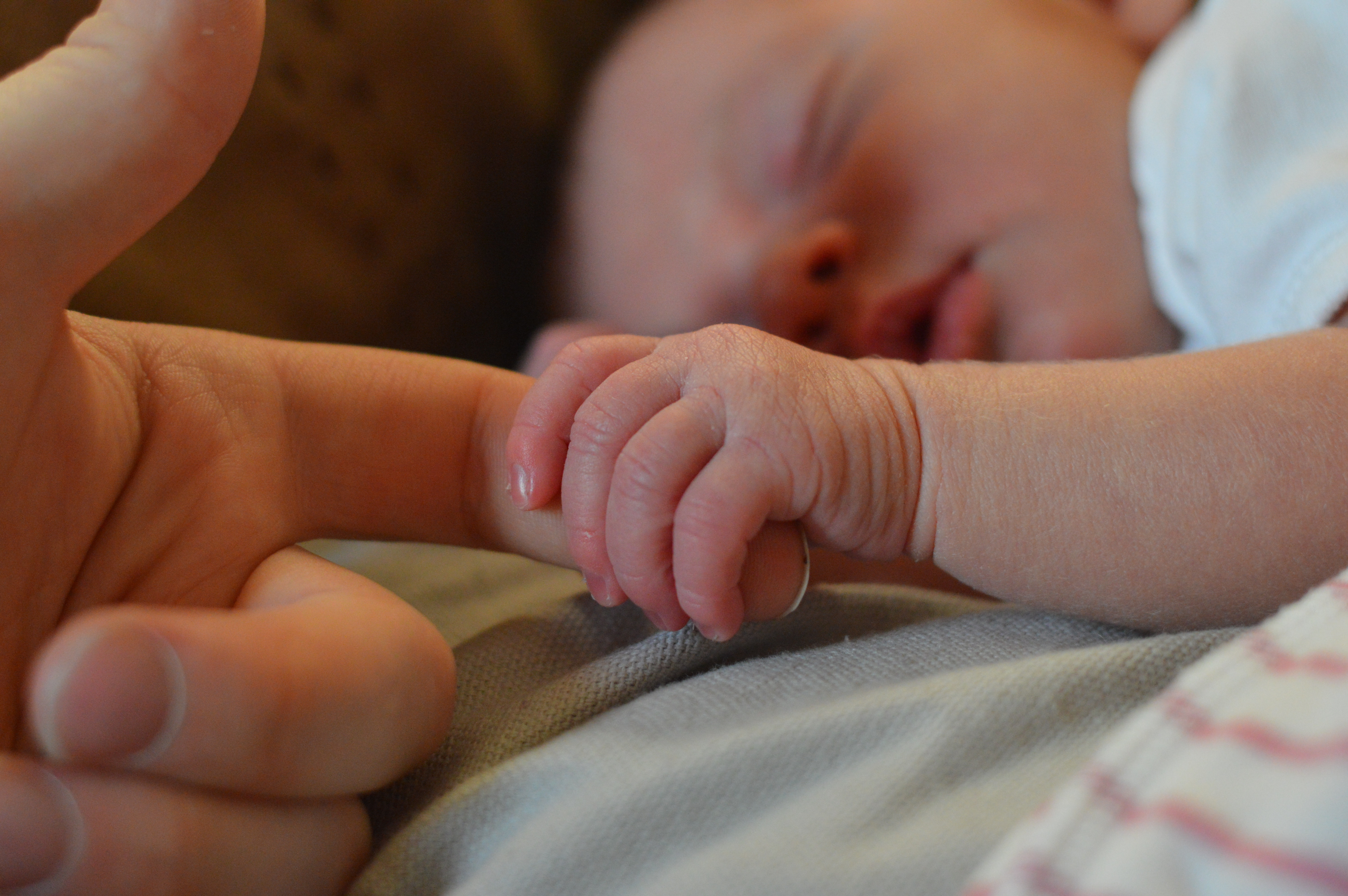 Siptomi se razlikuju kod beba i djece